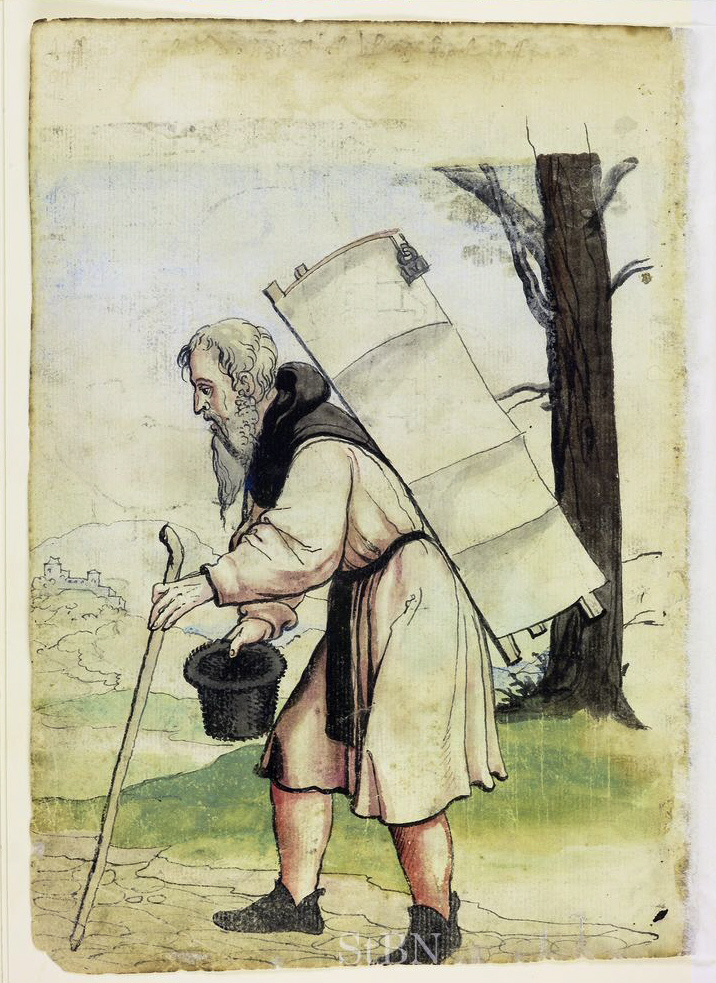 ulrich (Ulrich) fogel (Fogel; Vogel) , reff trager (Reffträger) Transkription und weitere Informationen